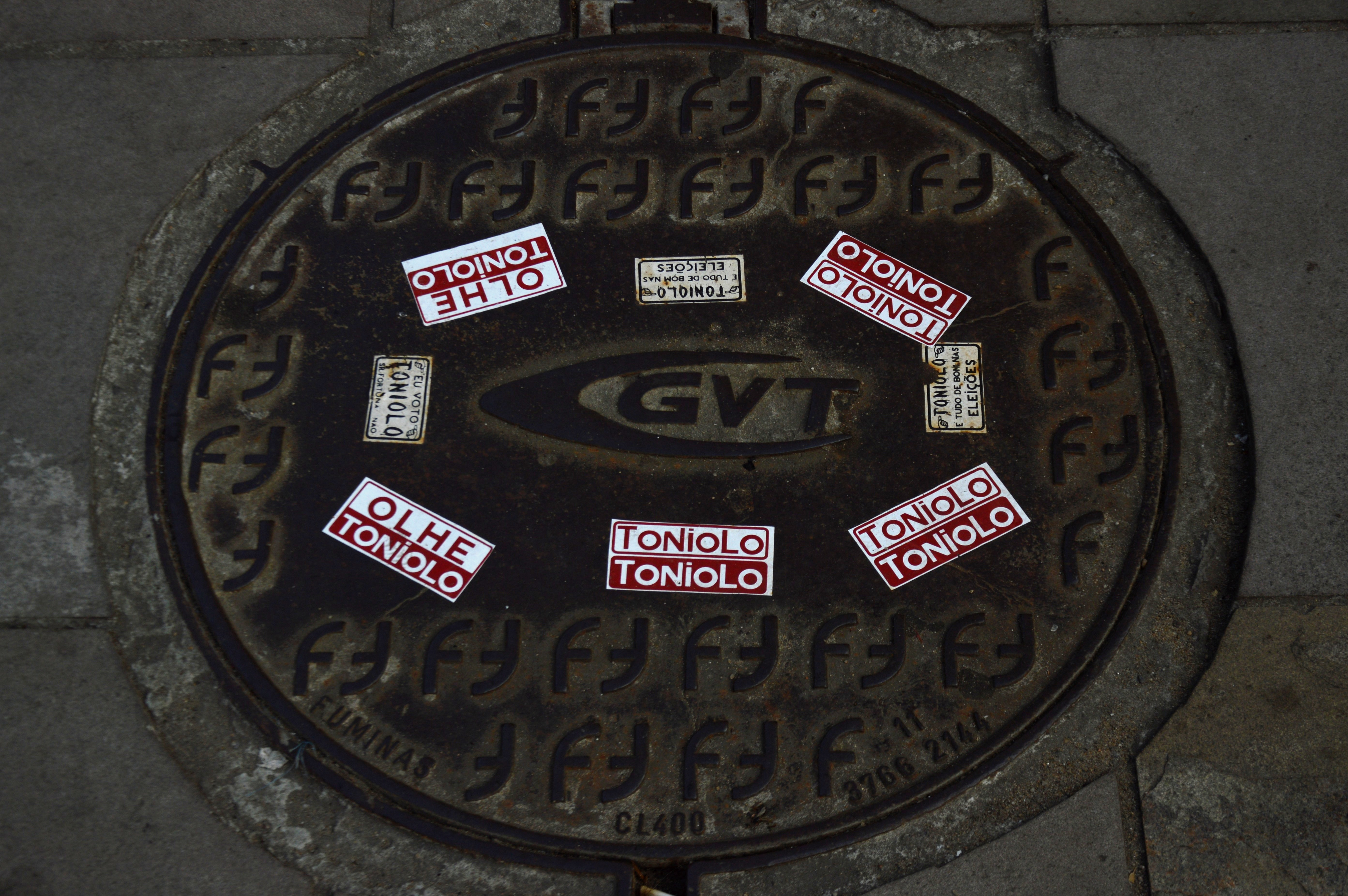 Tampa de bueiro no Centro de Porto Alegre com adesivos da campanha para Toniolo